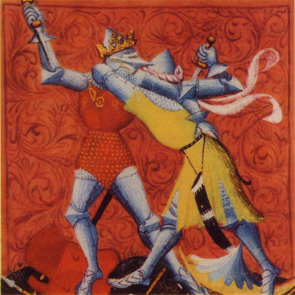 Clotaire II tue le duc Berthoualt. Manuscrit du XVe siècle. Grandes Chroniques de France. Bibliothèque nationale, Paris.